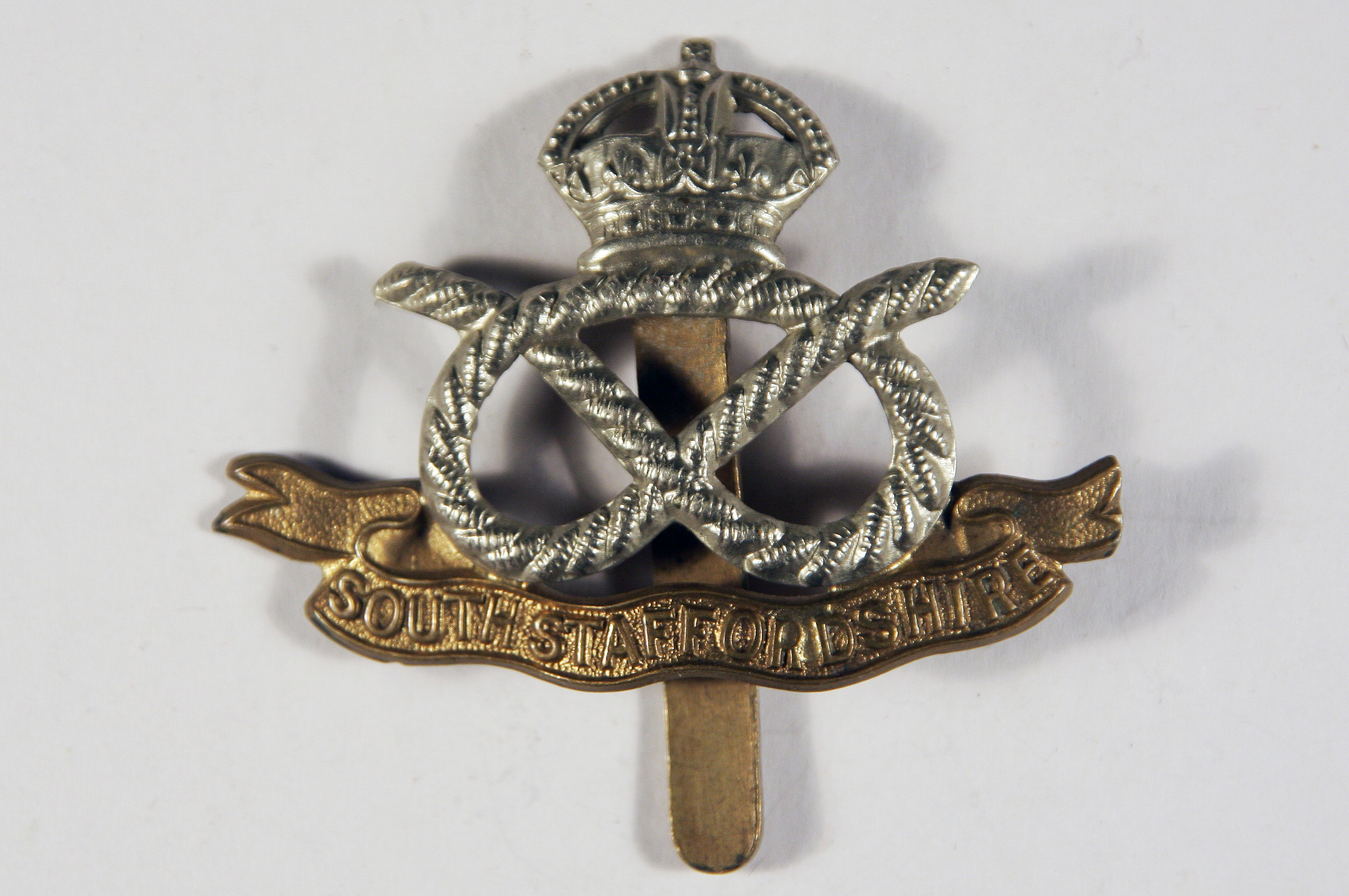 Beutestück